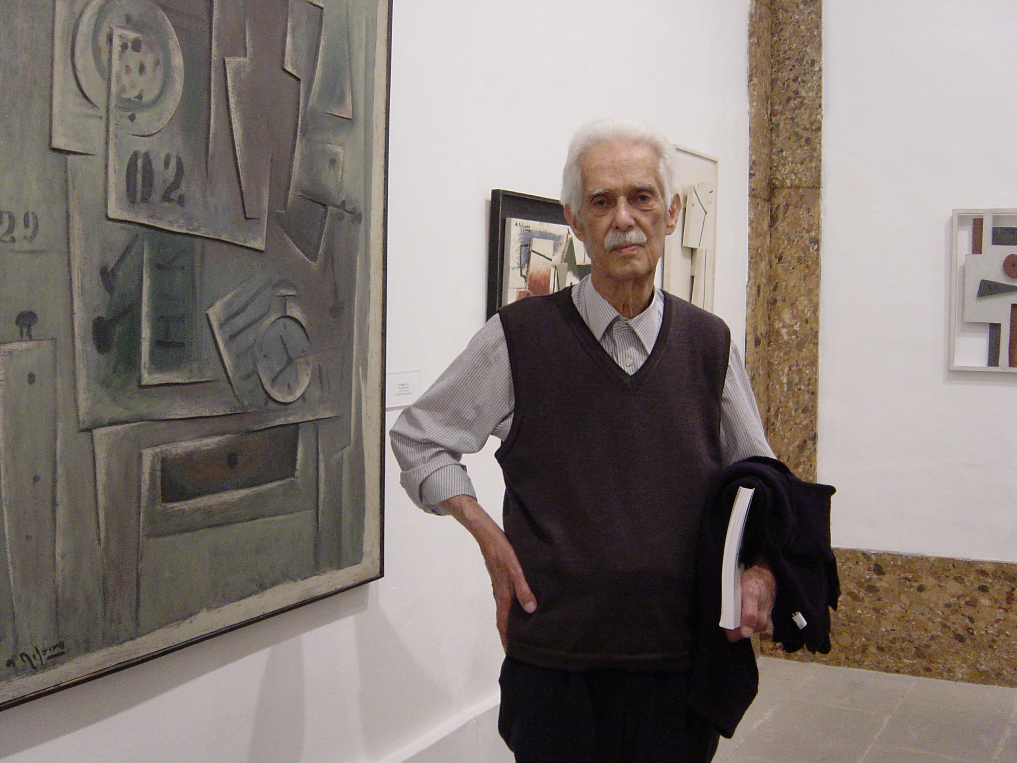 Alceu Ribeiro en el 'Palau Solleric' de Palma (Mallorca), con motivo de la exposición retrospectiva de su obra celebrada allí (año 2006).